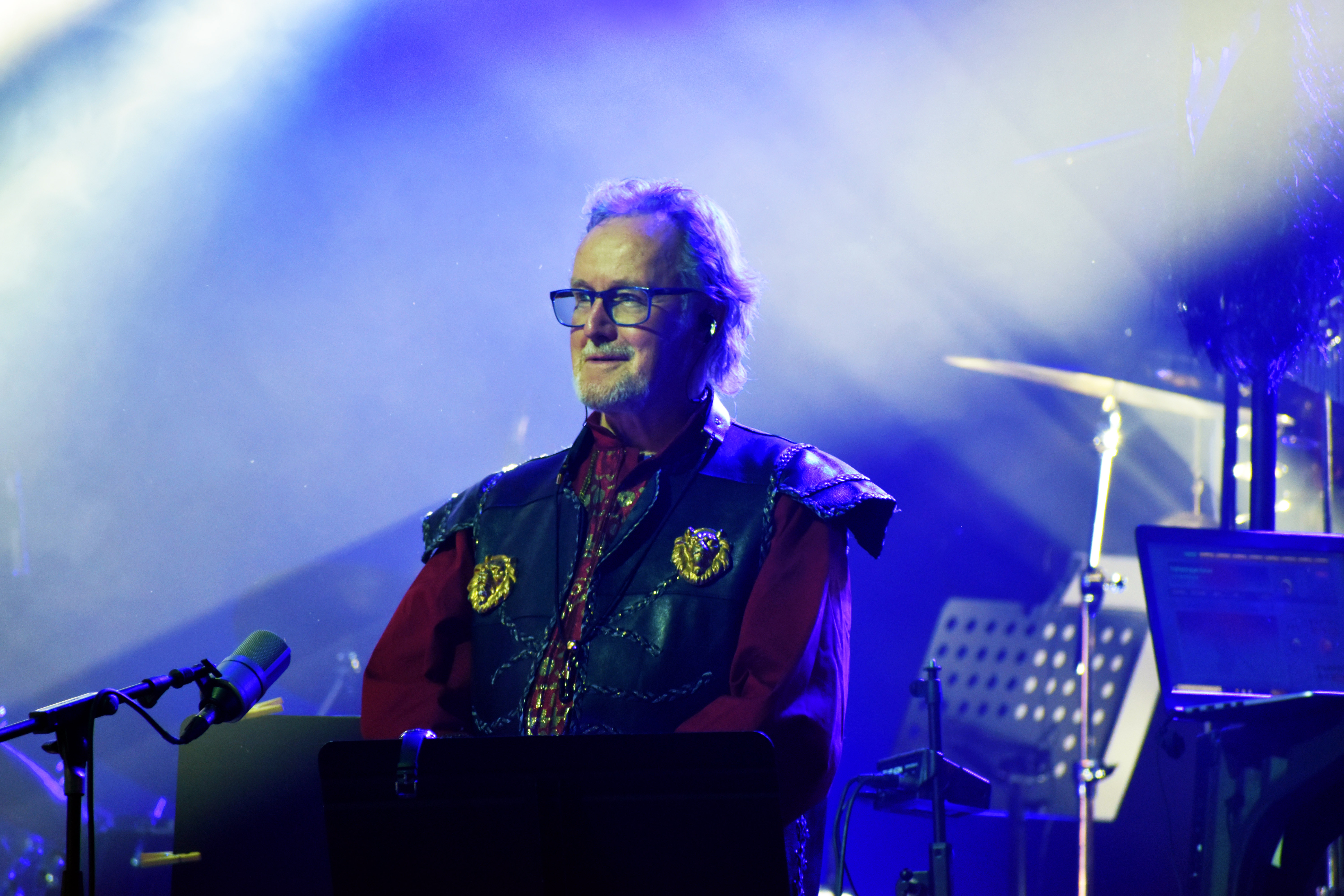 John Helliwell dans Excalibur au Motocultor Festival 2019.